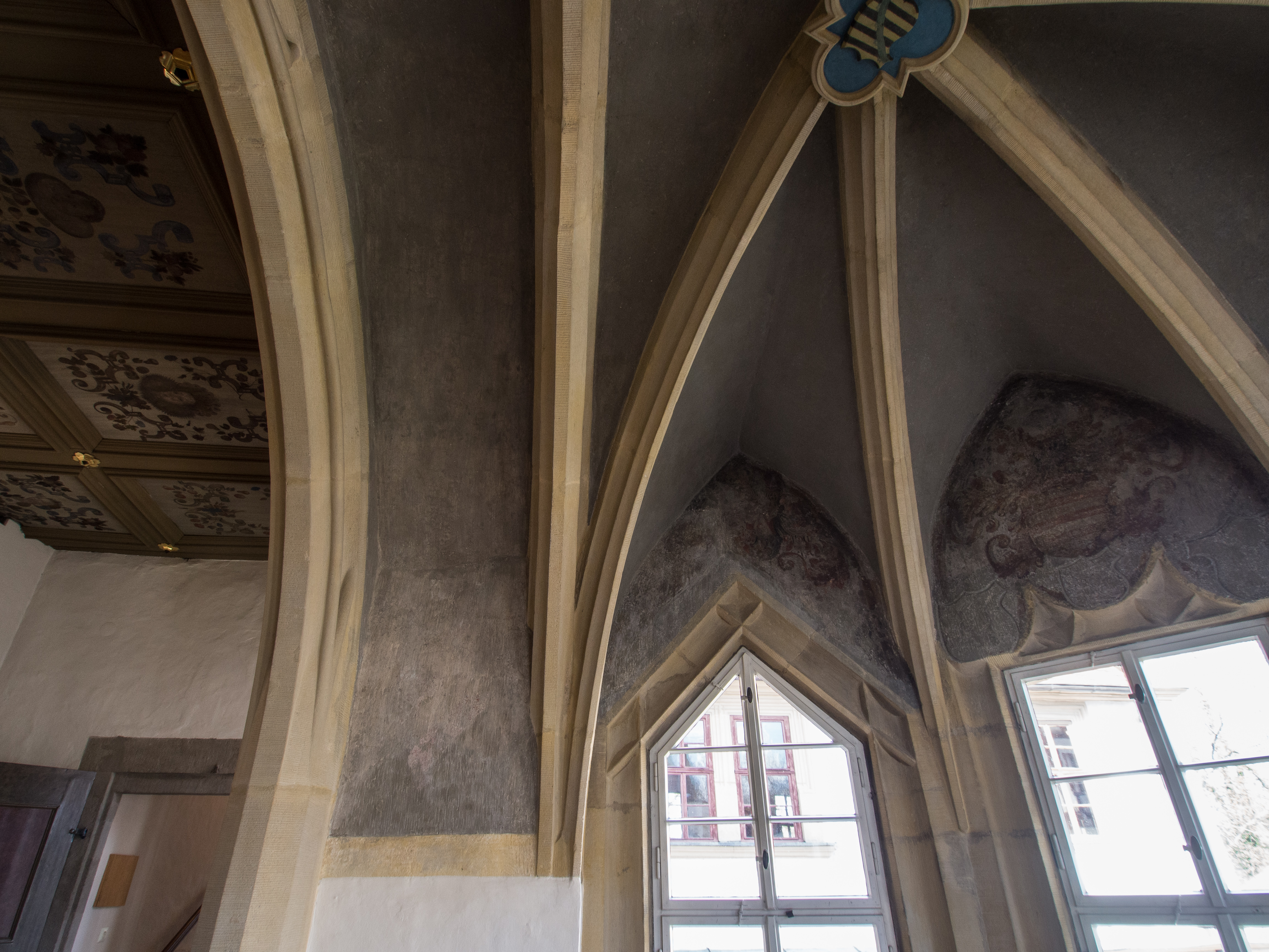 Schloss Hinterglauchau in Sachsen 2015